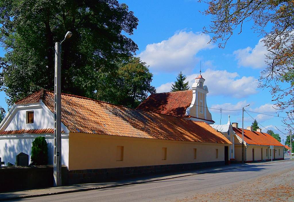 zespół budynków cmentarnych, 1773: kaplica p.w. św. Jakuba, 1799; kolumbarium; dom braci szpitalnych Chodecz, ul. Warszawska 22